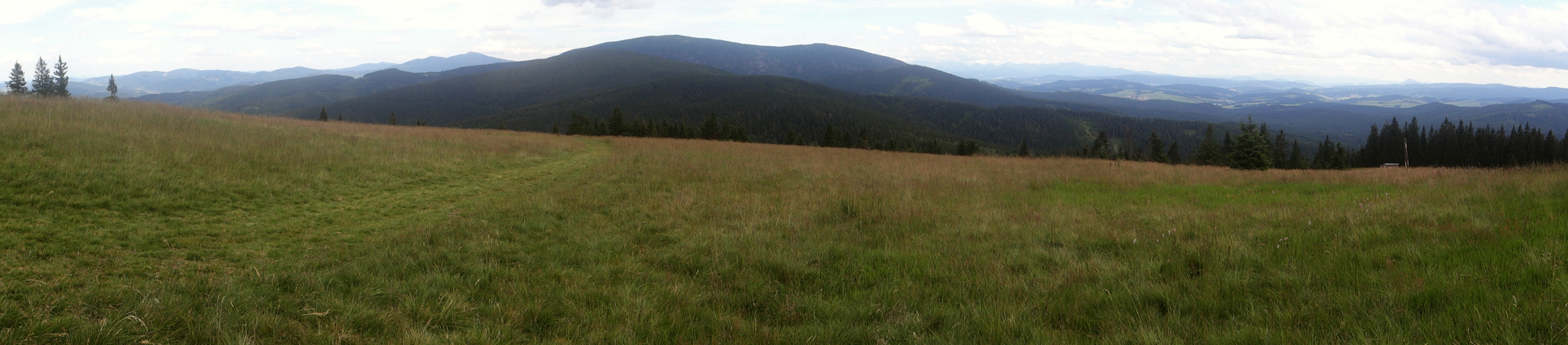 Widok z hali Rysianka